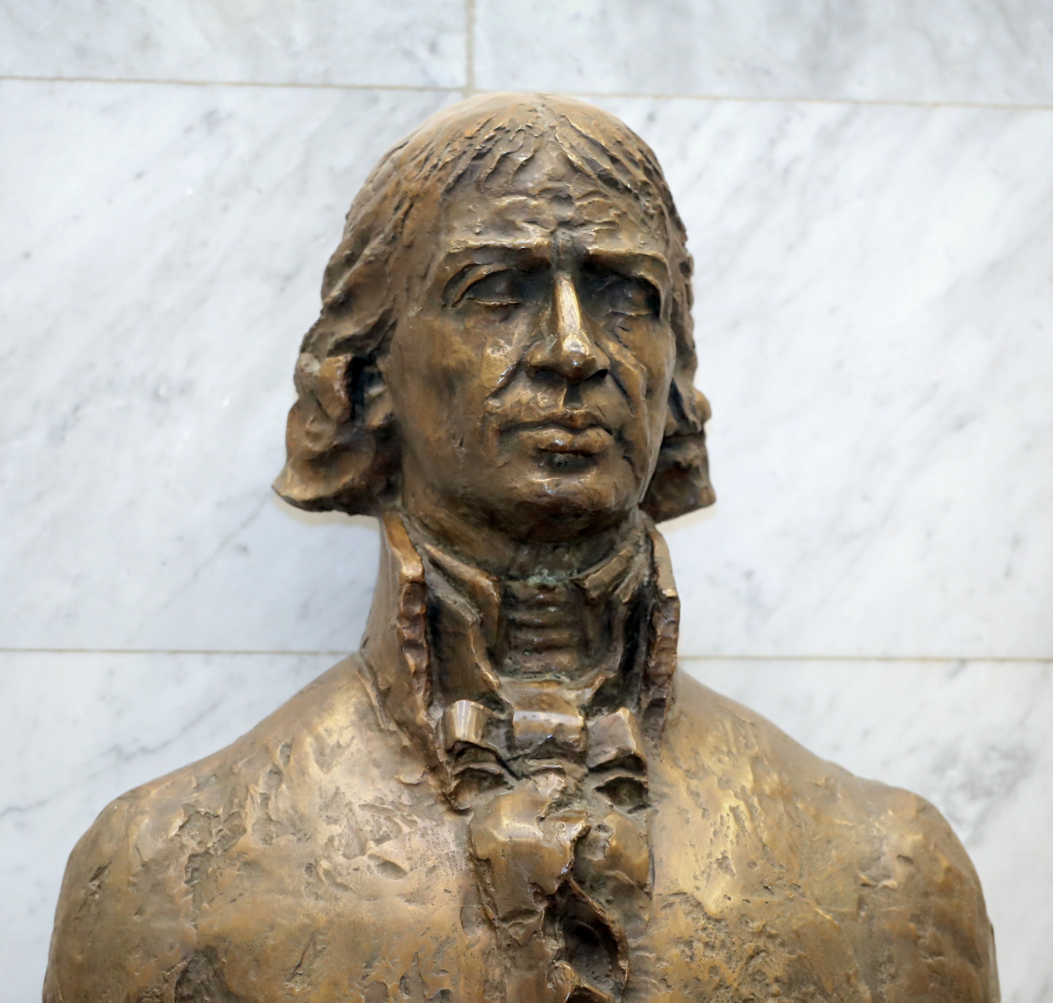 Gróf Széchényi Ferenc mellszobra az OSZK aulájban